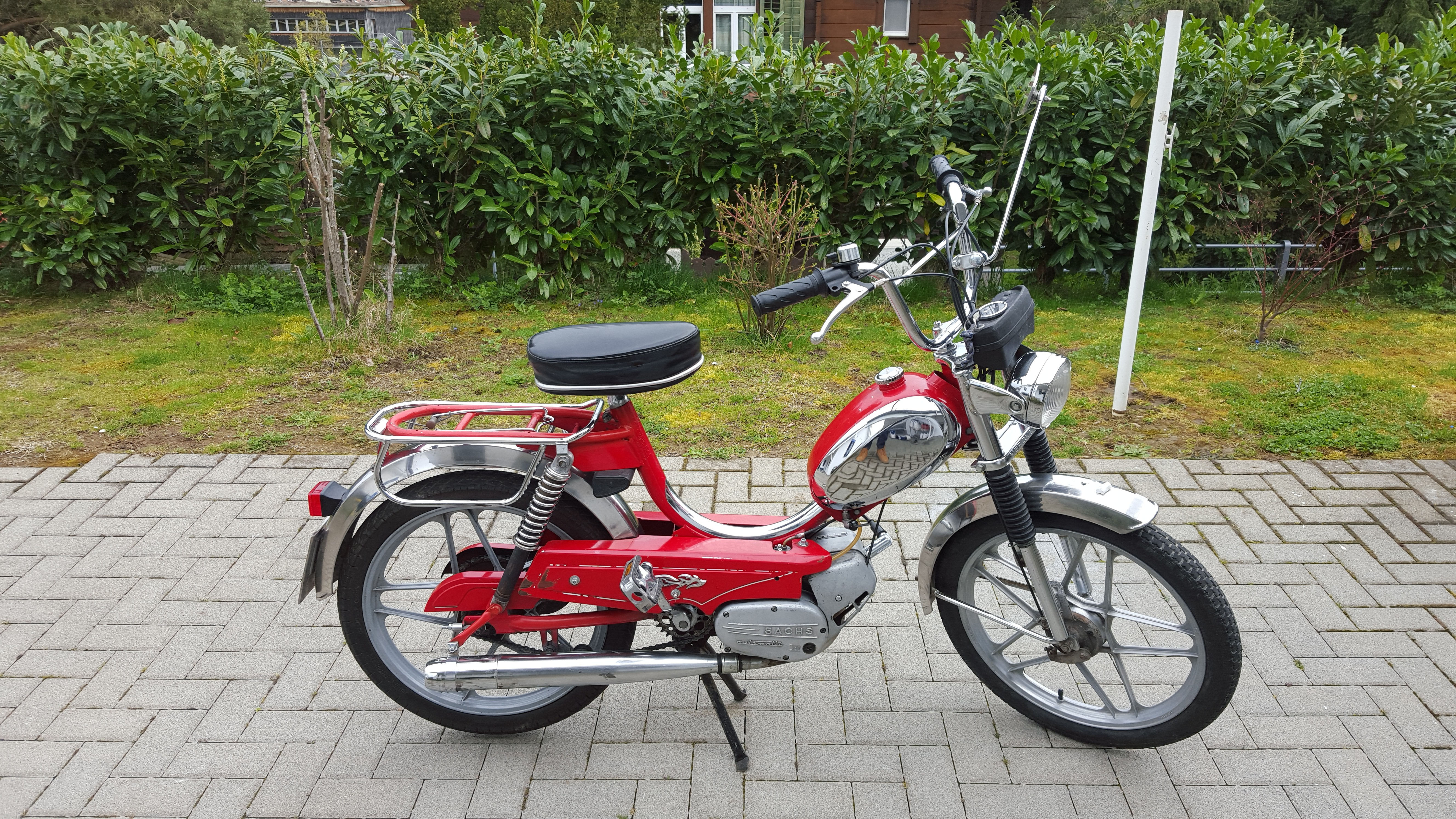 Sachs Hercules 503 Leergewicht 160 Kg Baujahr 1984